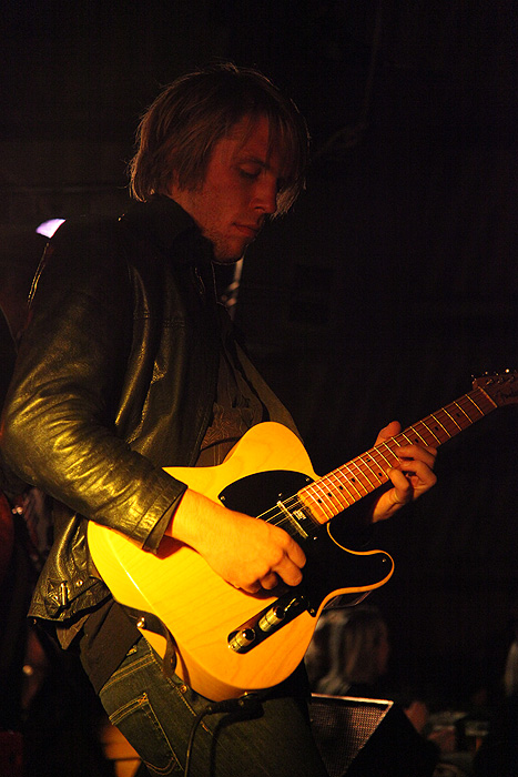 Jan Birger Akerhaugen i Ni Liv spiller telecaster i Seljord 2010